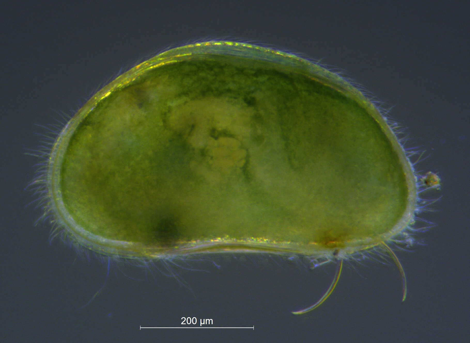 Krepsdyret bekkemuslingkreps (Potamocypris pallida)